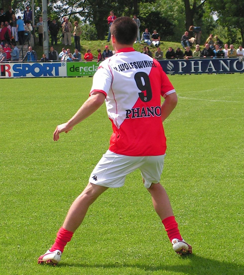 Nederlands voetballer Ricky van Wolfswinkel in het tenue van FC Utrecht